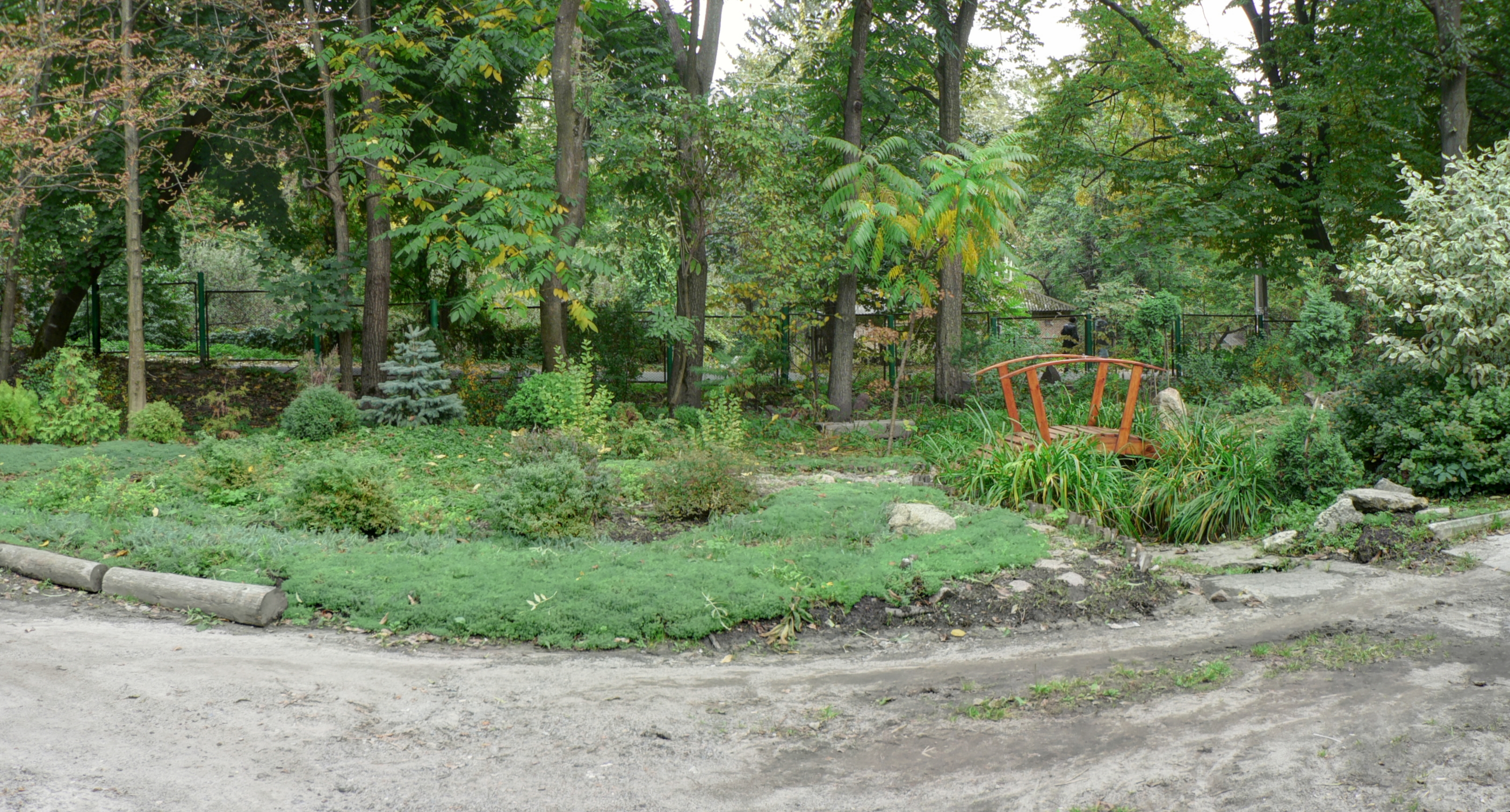 Ботанічний сад Національного аграрного університету, Київ, Героїв Оборони вул.